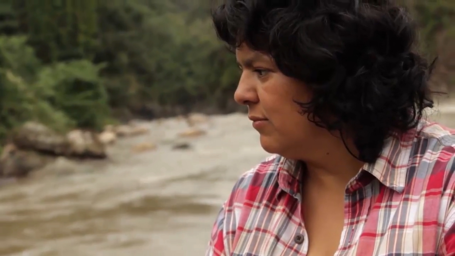 Berta Cáceres, activista por los derechos de los pueblos indígenas. Fotograma del video de homenaje por el premio póstumo Champions of Earth 2017, de ONU Medio Ambiente.